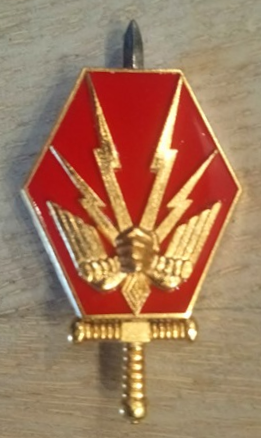 Insigne du Commandement des forces terrestres (CFT), situé à Lille